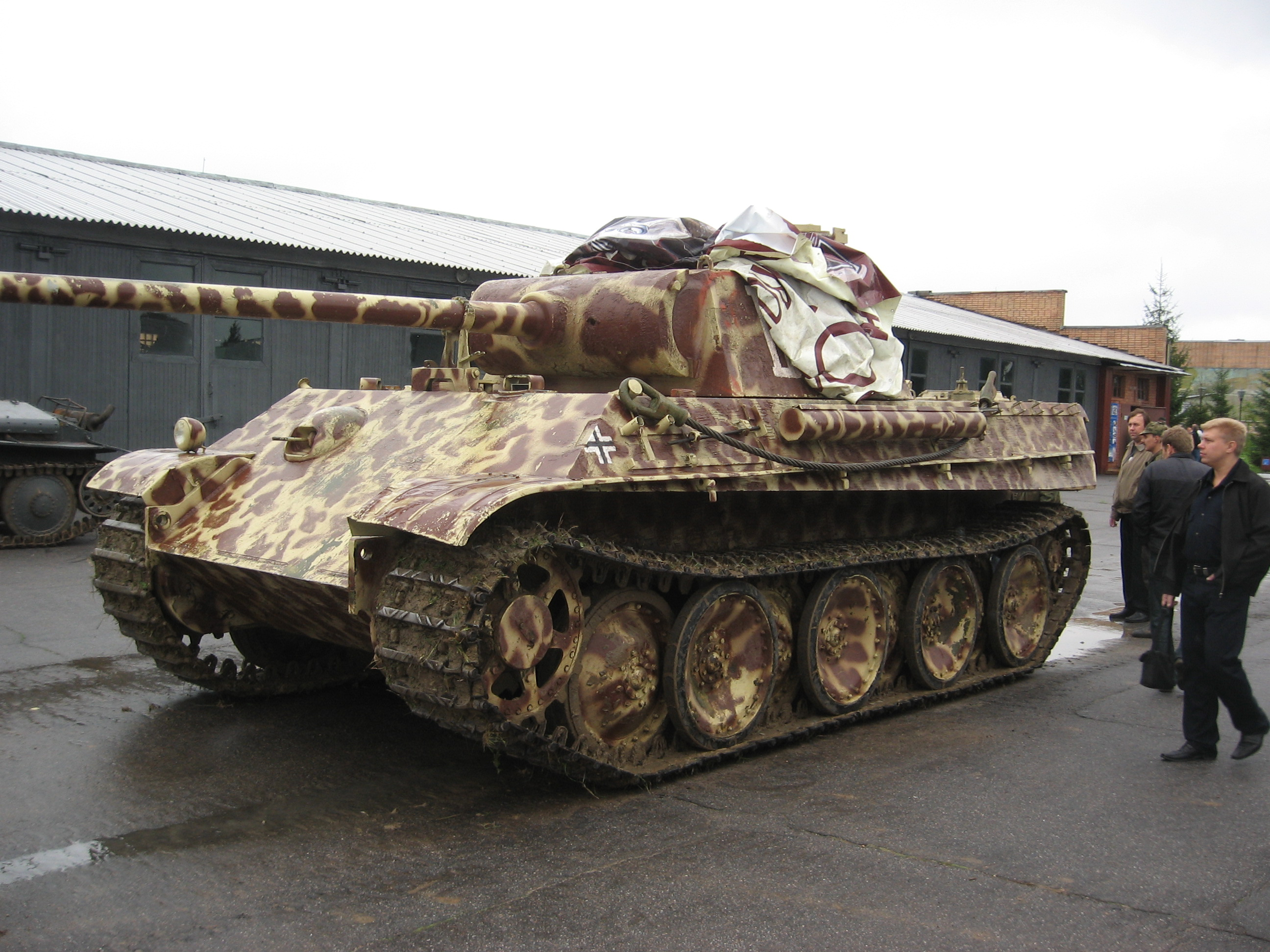 PanzerV Ausf G. музей БТ и В кубинка